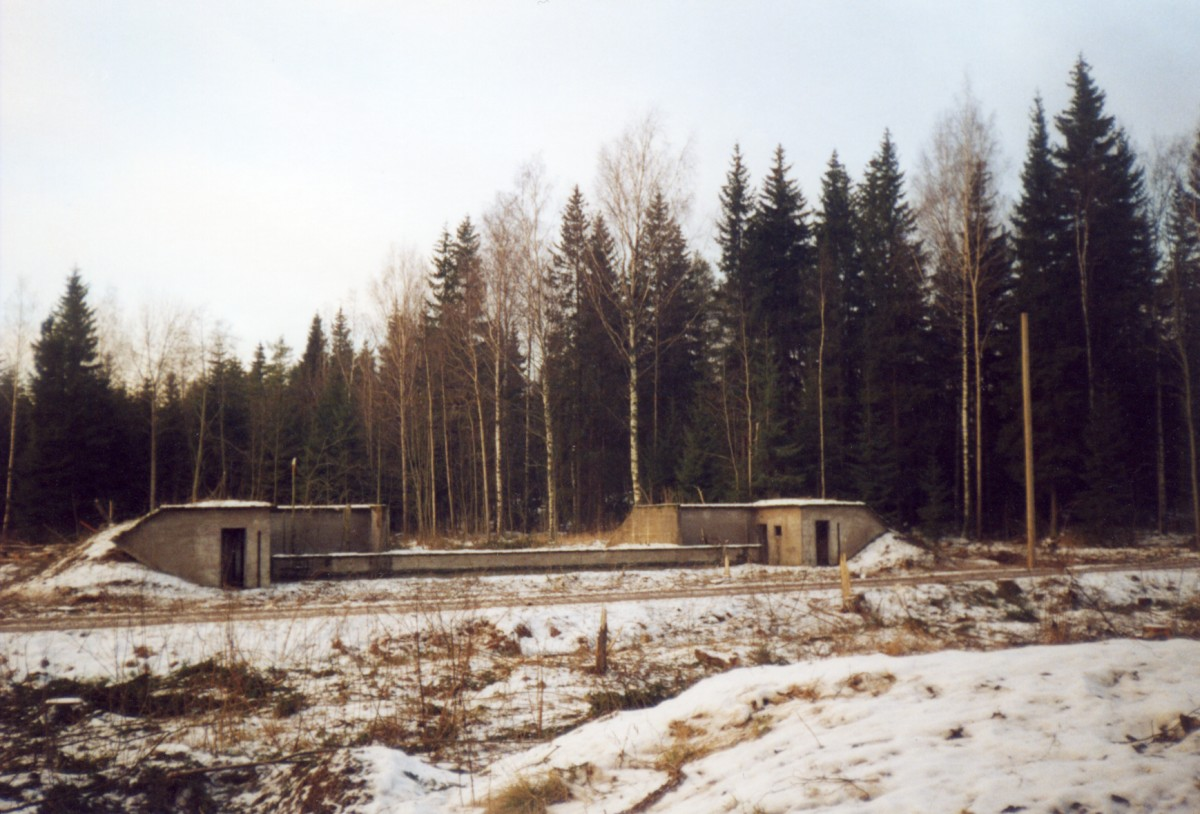 Ampumaradan osanen 2 Purettu